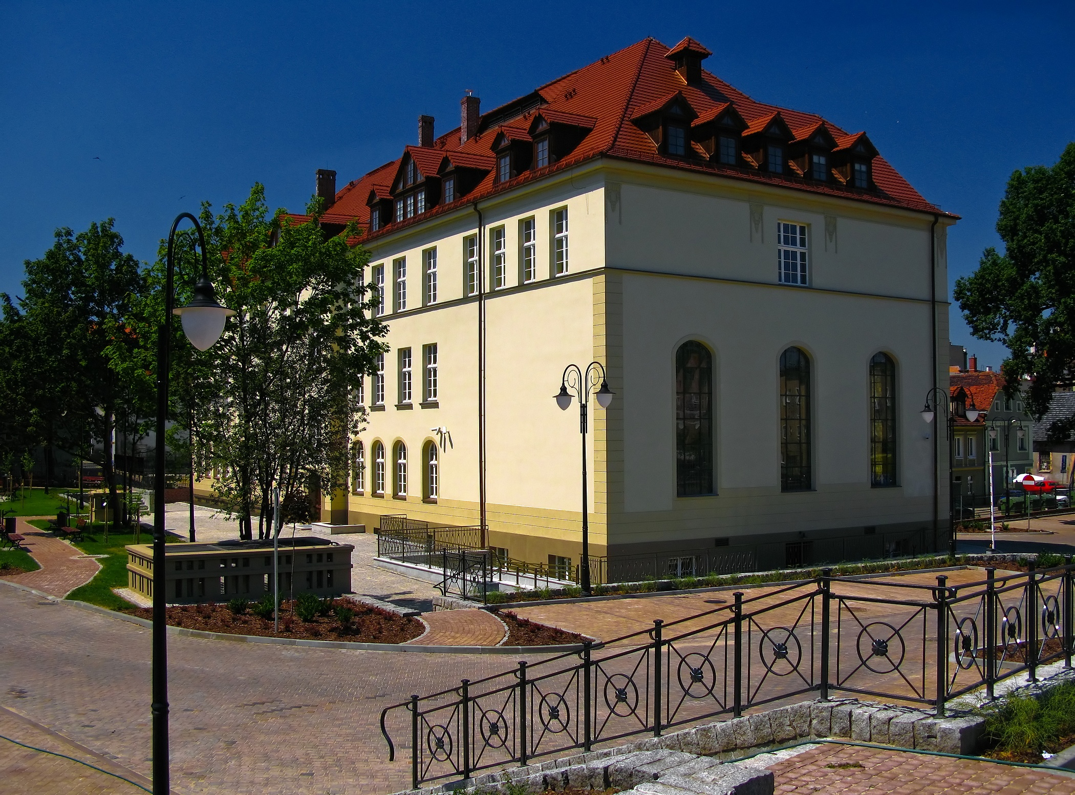 Zielona Góra, ul. Licealna 9 - budynek rektoratu Uniwersytetu Zielonogórskiego